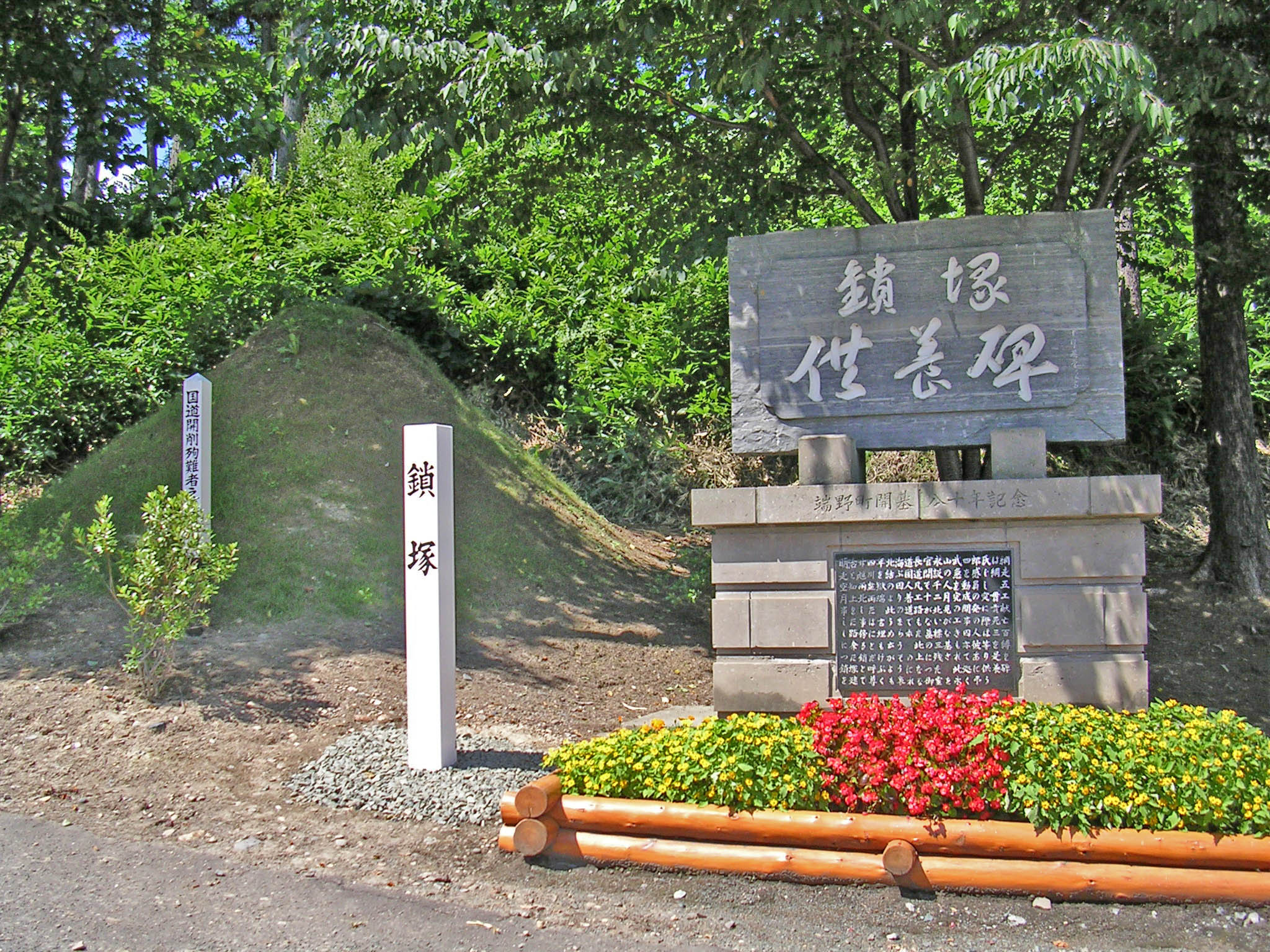 鎖塚